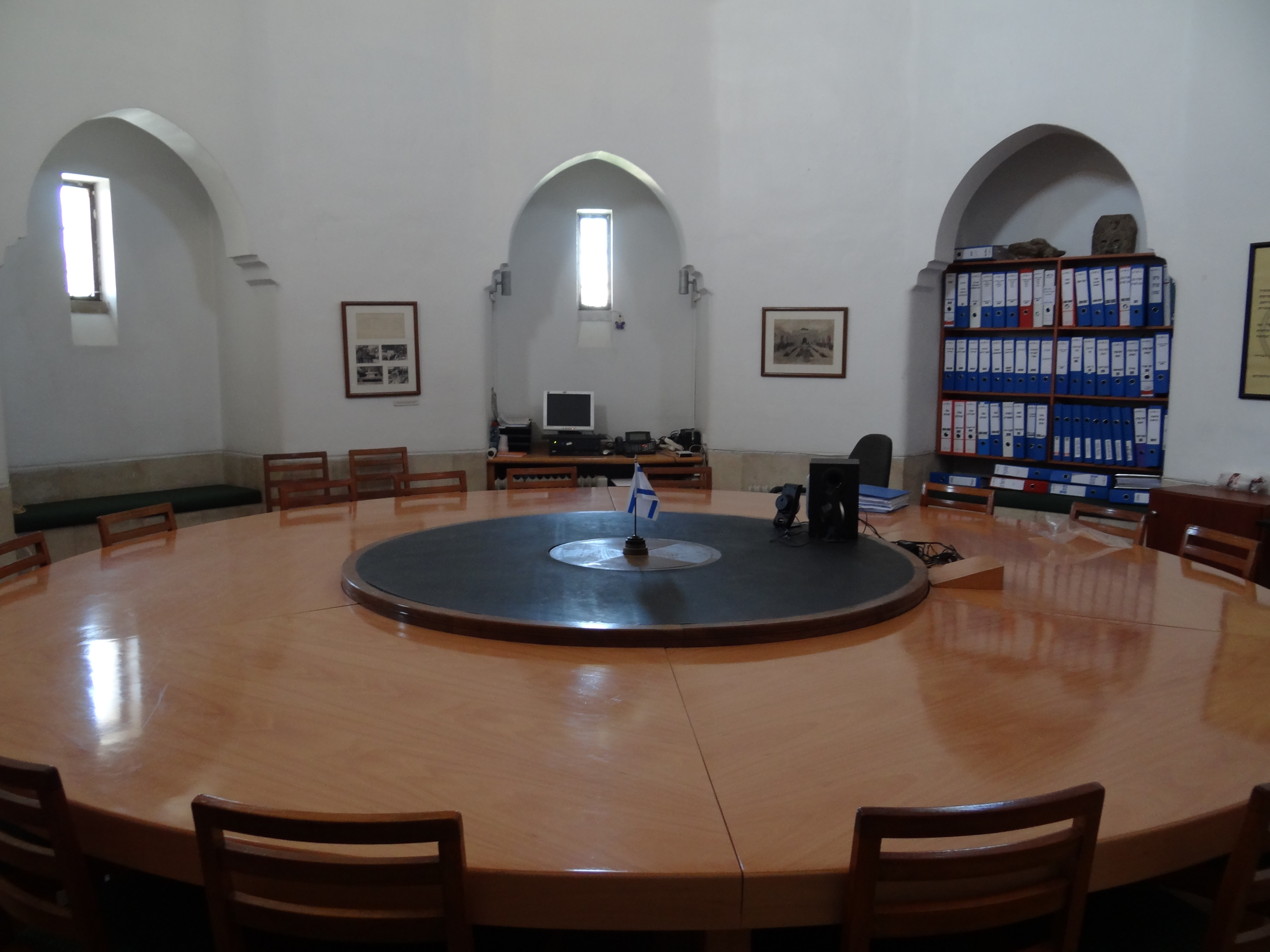 Inscription in the round conference room of the Rockefeller Museum Israel Antiquities Authority, which appears in the dialogue by Plato. The Inscription is set by the Rockefeller Museum architect during the construction of the building כתובת בחדר הישיבות העגול של רשות העתיקות במוזיאון רוקפלר, ובה מופיע דיאלוג שכתב אפלטון. הכתובת נקבעה על ידי אדריכל מוזיאון רוקפלר בעת בניית המבנה. הפעם הראשונה בה הוזכרה בכתובים המילה "ארכאולוגיה" הייתה בדיאלוג פרי עטו של אפלטון המספר על שיחה שהתקיימה בין סוקרטס הפילוסוף היווני בן המאה ה-5 לפנה"ס והיפיאס. בשיחה עונה היפיאס לשאלת סוקרטס "מה מעניין אנשים?", תשובת היפיאס היתה: "עמים, גיבורים ובני אדם, יישובים וכיצד נוסדו הערים בימי קדם, ובקיצור, הם מוכנים לשמוע על ארכאולוגיה". (אפלטון,היפיאס רבה, 285 ד).